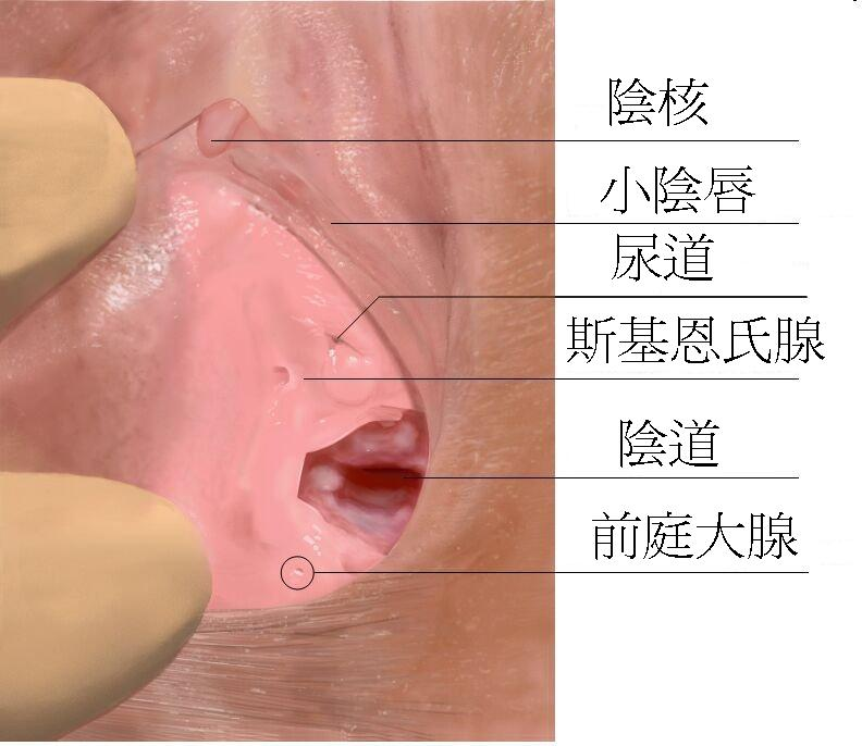 描述摘要 }